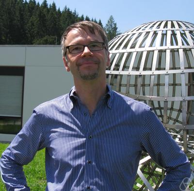 Foto di Gero Friesecke